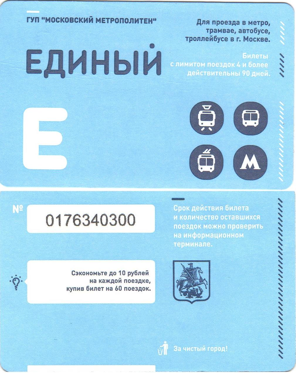 Единый билет Москвы